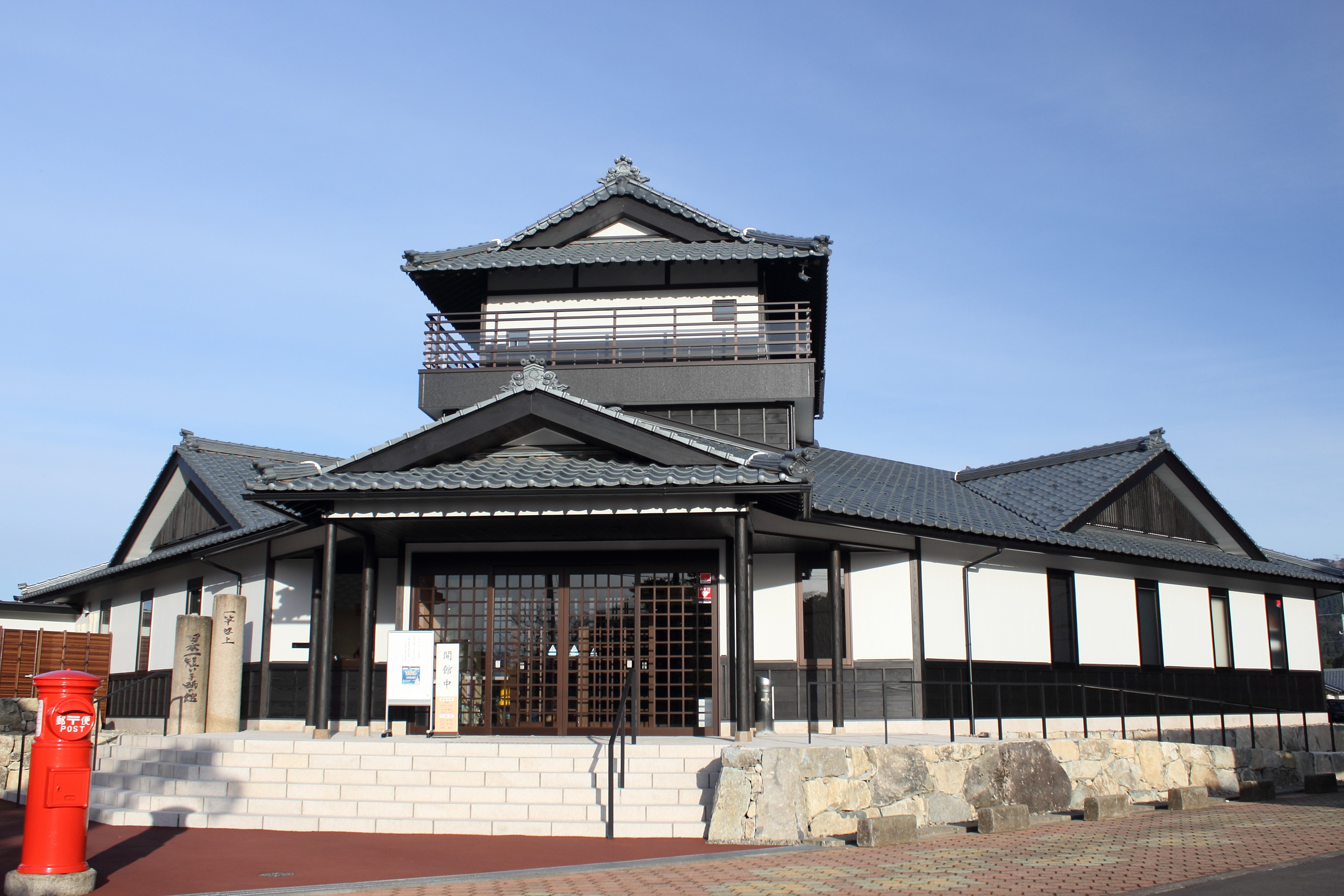 日本一短い手紙の館（青空バージョン）